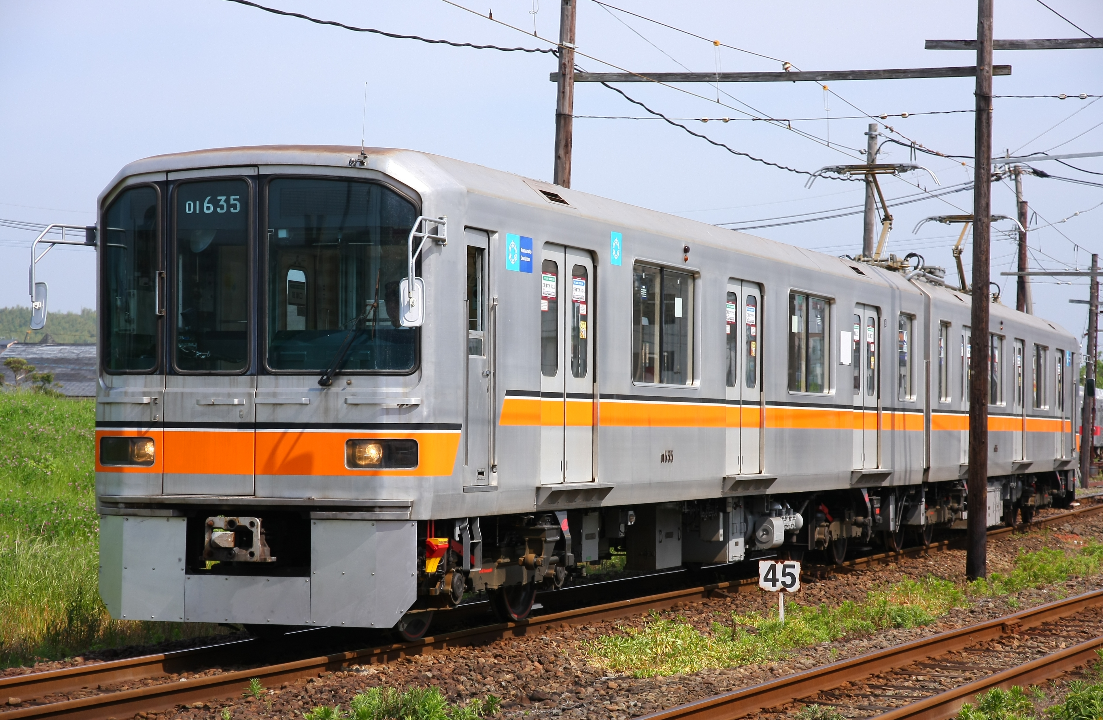 スカートが取り付けられた熊本電鉄01系（01-135+01-635編成）。